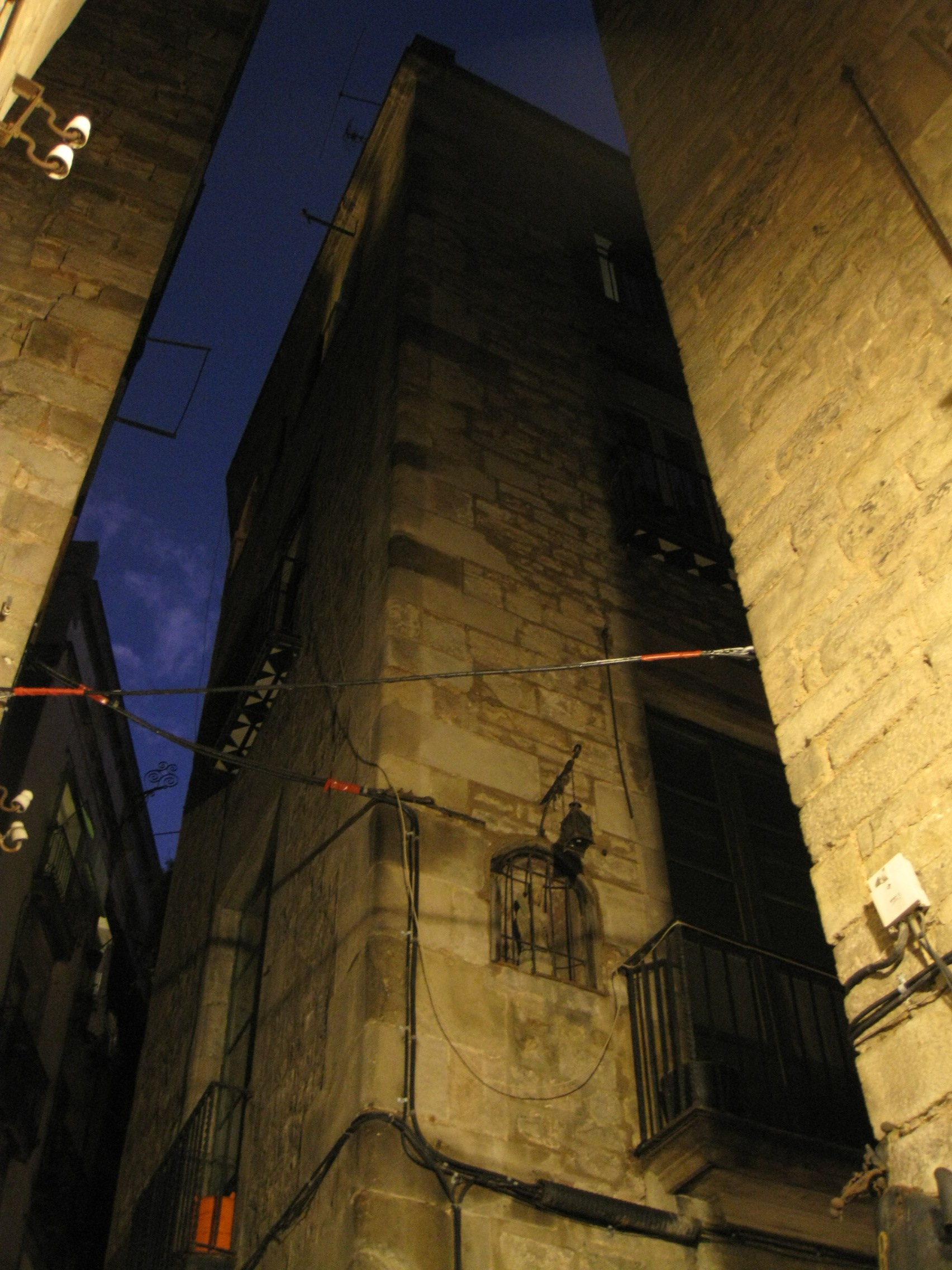 Edifici originari dels segles XVI-XVII, situat al carrer de Sant Domènec del Call núm. 7, a la cantonada amb el carrer de Marlet, al barri Gòtic de Barcelona. Fou renovat a la dècada del 1960. A l'alçada del principal hi ha una capelleta tancada amb una reixa on hi ha una imatge de terracota de Sant Domènec.